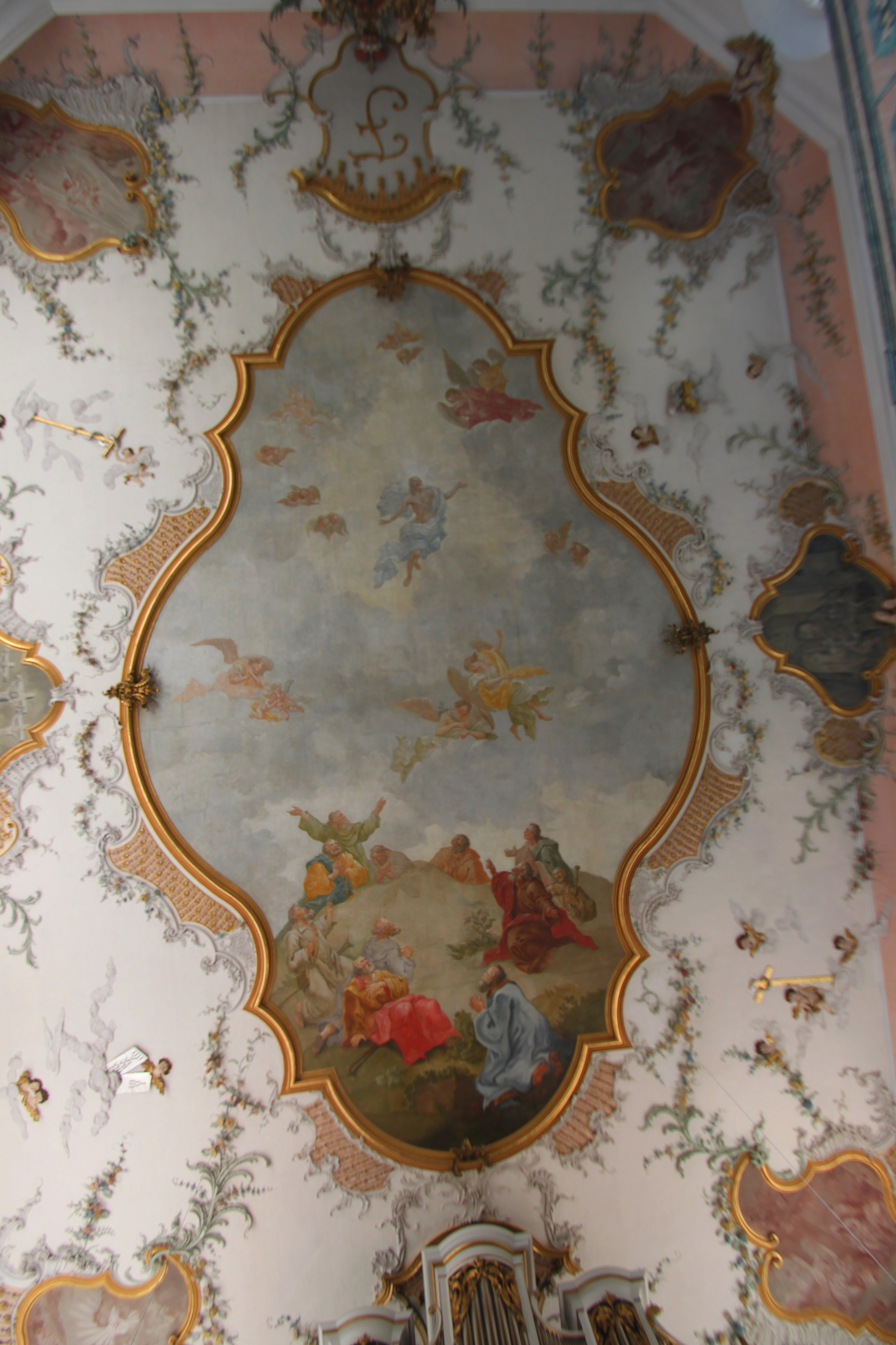 Evangelisch-lutherische Dreifaltigkeitskirche NeudrossenfeldThis is a photograph of an architectural monument.